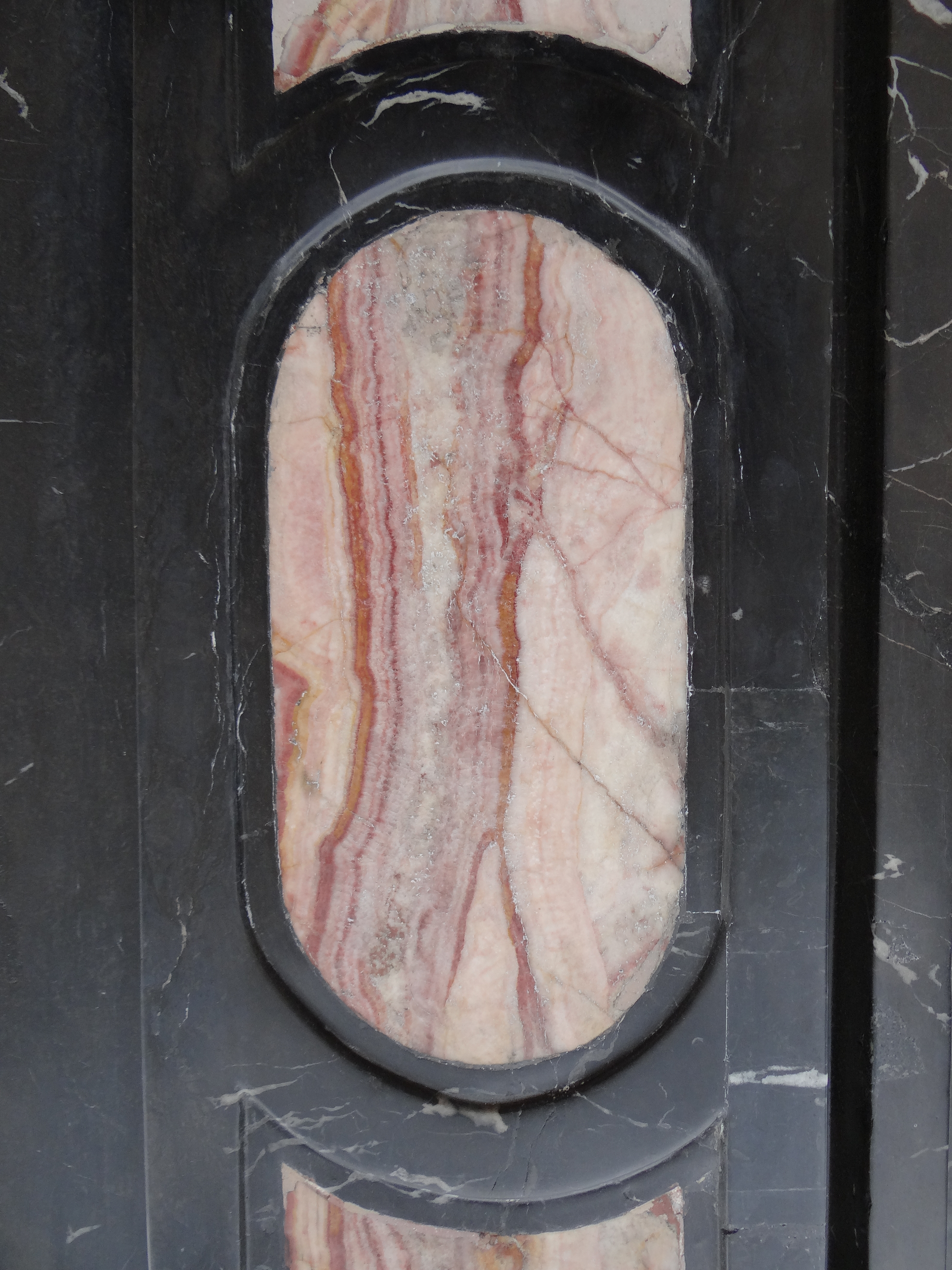 Kraków Rynek Główny. Portal kość. św. Wojciecha inkrustowany różowym marmurem paczółtowickim.